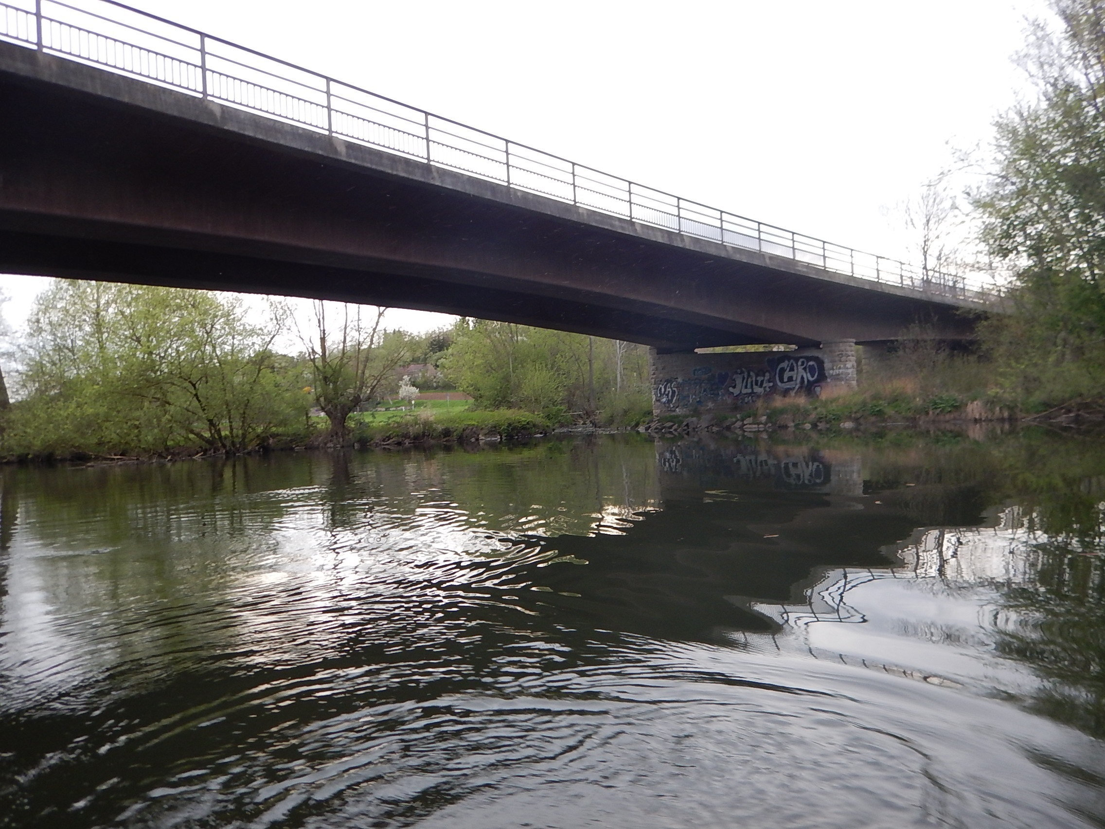 Mündung der Schmie in die Enz beim westlichen Brückenkopf der B10-Brücke Vaihingen Seemühle